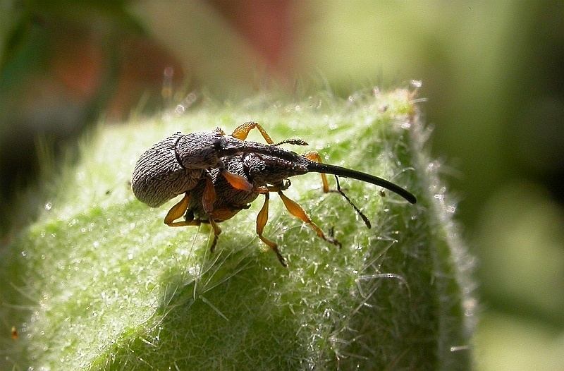 Rhopalapion longirostre, Gradignan, Gironde, France